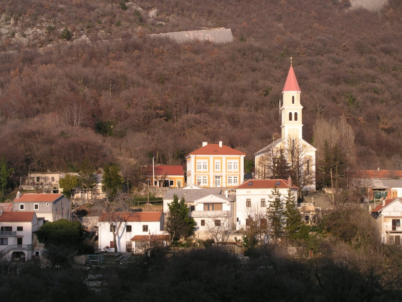 Križišće, Hrvatska